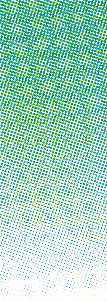 Grün, Zusammendruck von Gelb und Cyan